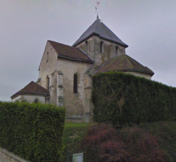 Eglise de Nuisement sur Coole